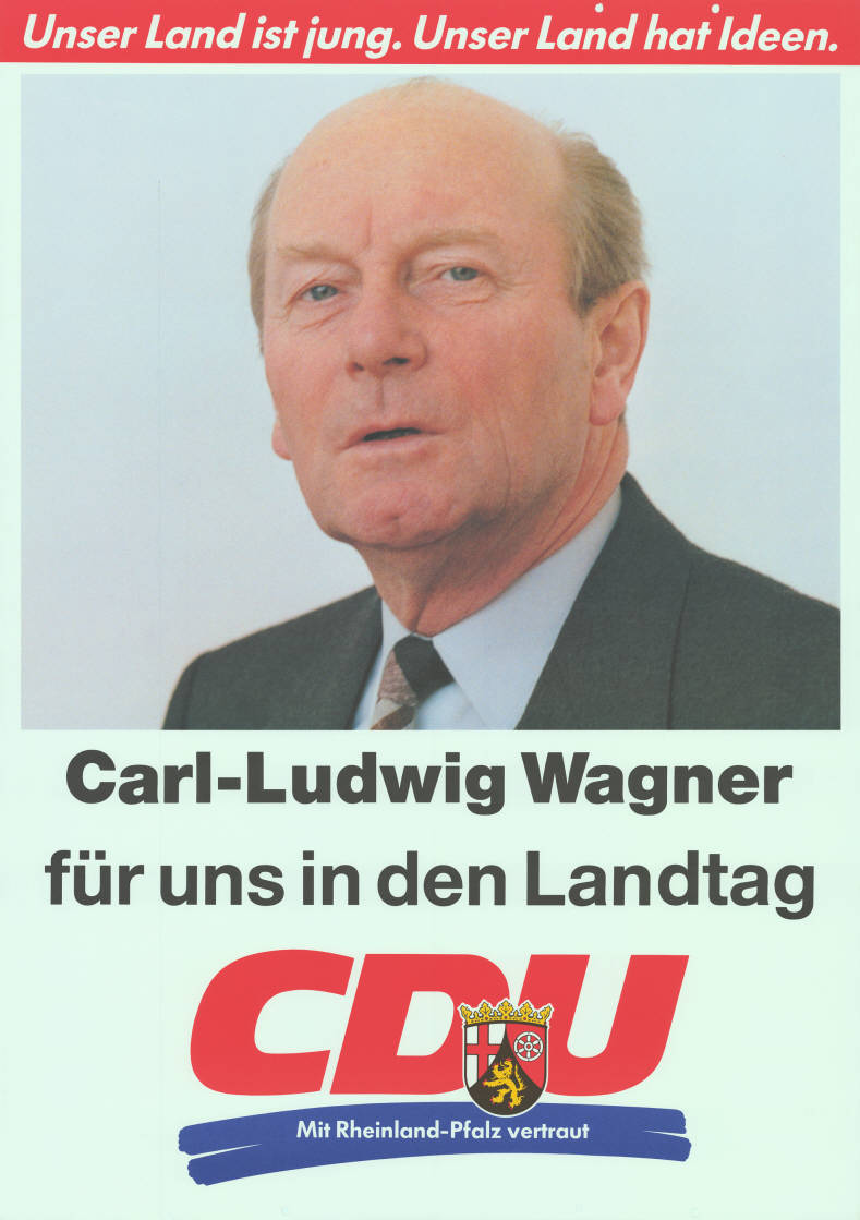 Unser Land ist jung. Unser Land hat Ideen. Carl-Ludwig Wagner für uns in den Landtag CDU Mit Rheinland-Pfalz vertraut Abbildung: Porträtfoto Plakatart: Kandidaten-/Personenplakat mit Porträt Auftraggeber: CDU-Rheinland-Pfalz Objekt-Signatur: 10-010 : 562 Bestand: Landtagswahlplakate Rheinland-Pfalz (10-010) GliederungBestand10-18: Landtagswahlplakate Rheinland-Pfalz (10-010) » CDU Lizenz: KAS/ACDP 10-010 : 562 CC-BY-SA 3.0 DE